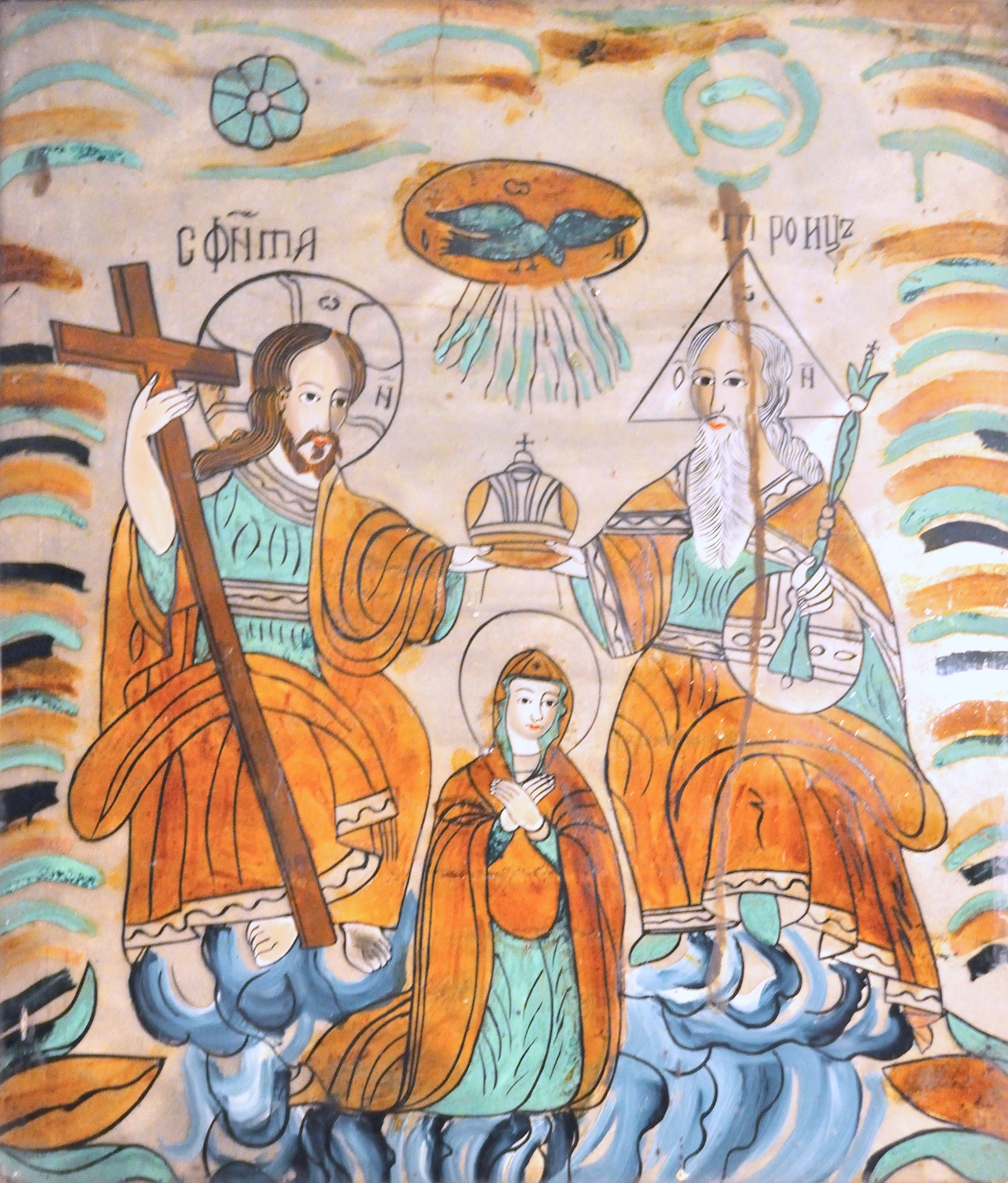 Biserica de lemn „Sfinții împărați Constantin și Elena” din Bârlești, județul Alba